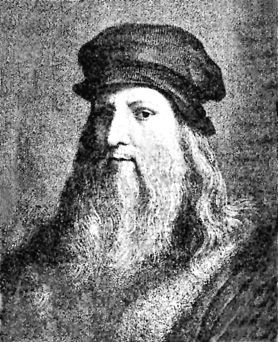 Pengubahsuaian gambar daripada Wikimedia Commons yang bertajuk Leonardo da Vinci.jpeg.